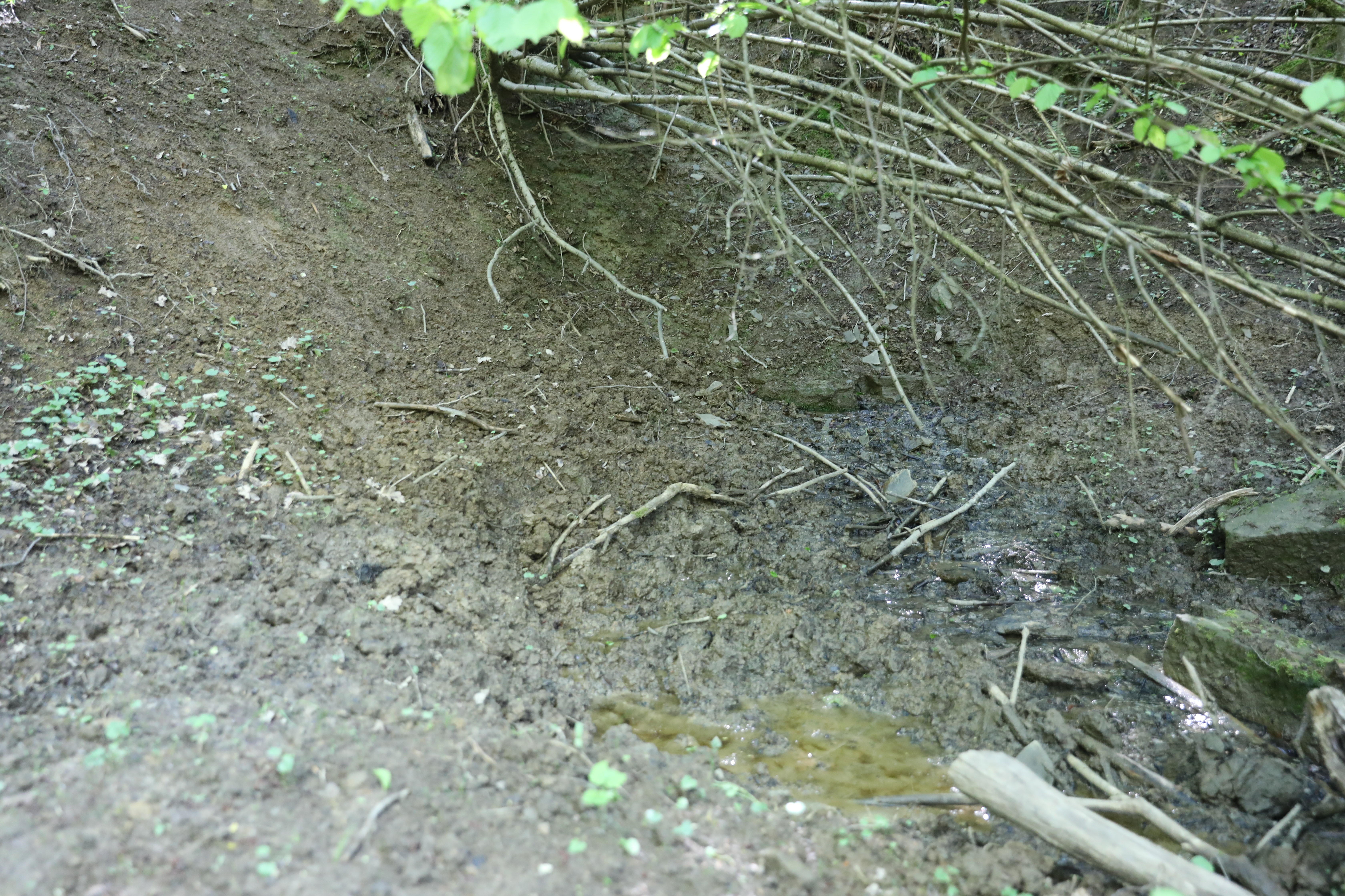 Forst Gellnhausen